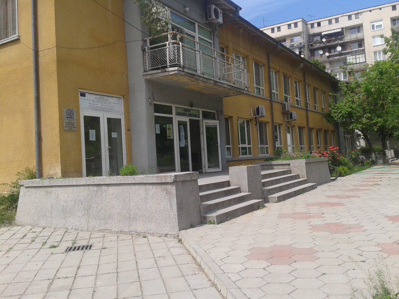 Дневен център към Областен съвет на БЧК - гр. Пловдив, ул. Изток №48